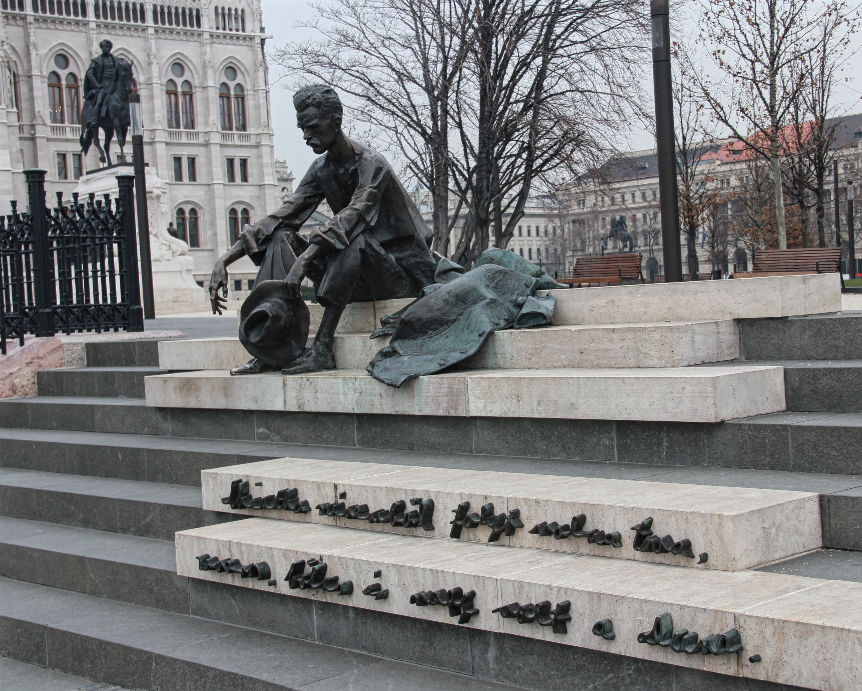 נמצא מדרום לבנין הפרלמנט על גדת הדנובה, הוצב ב-1980 ע"י הפסל מרטון לסלו